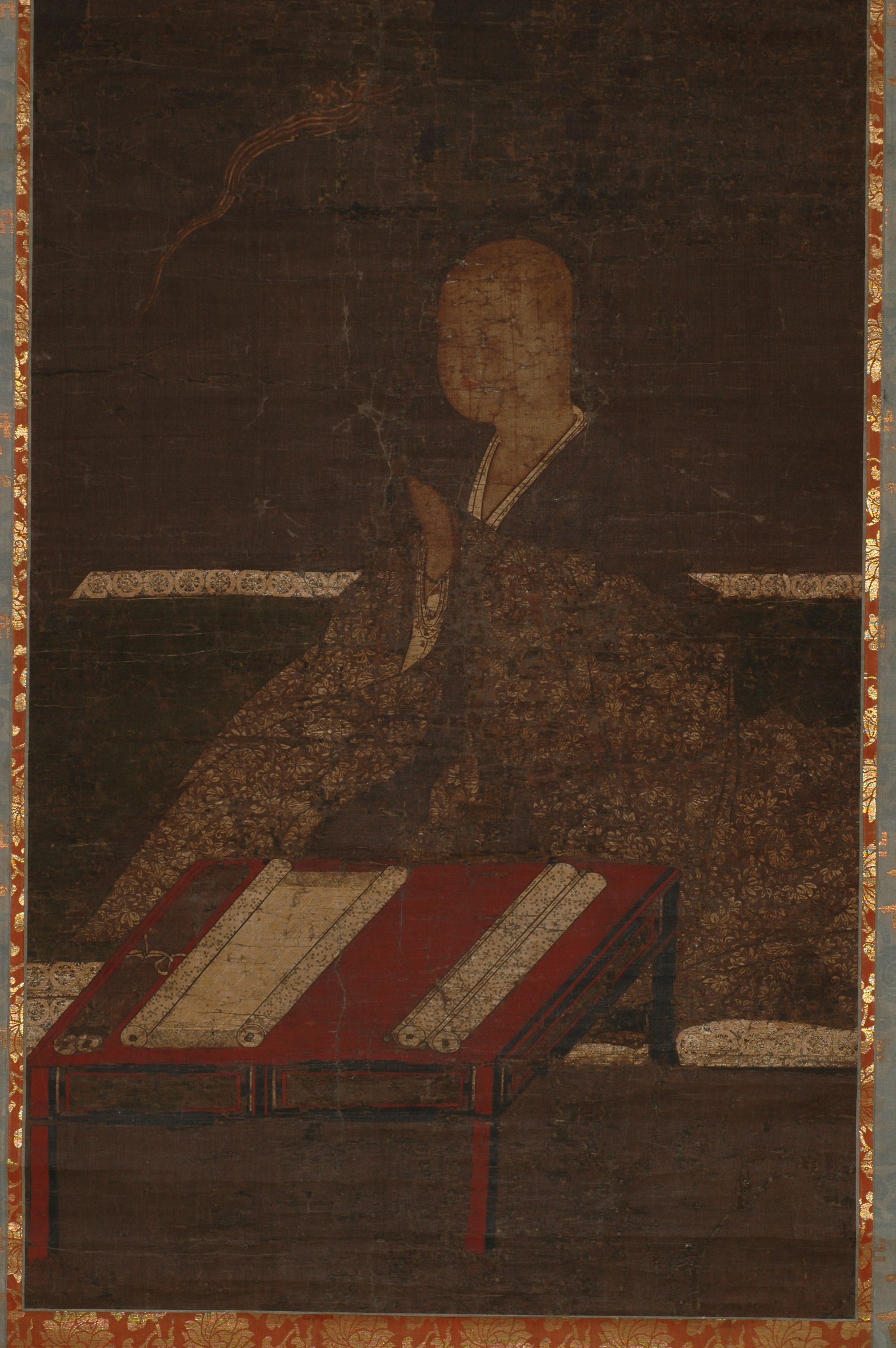 「（鎌倉時代）に遡る中将姫像は本図が知られるのみである。またわが国の肖像画中、単独の女性像として最古級の一つと目され、絵画史上においても重要な作品である」（奈良県有形文化財答申書より）